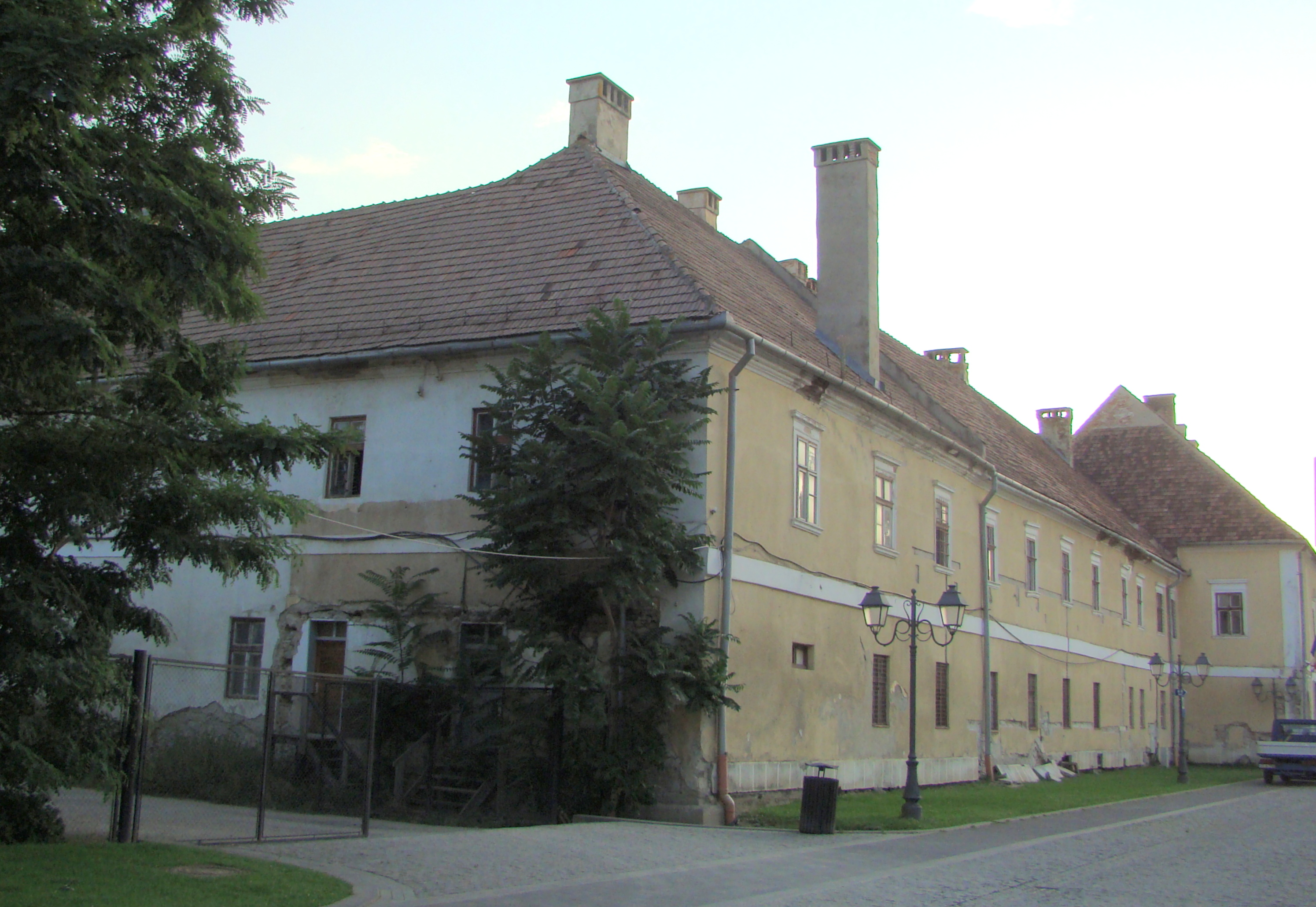 Palatul Principilor, azi Cercul Militar, municipiul Alba Iulia